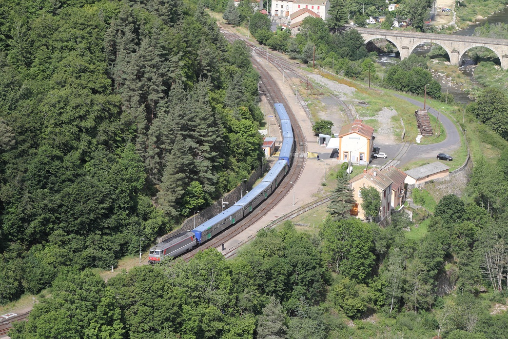 La gare de Chapeauroux en août 2011, Lozère, France.